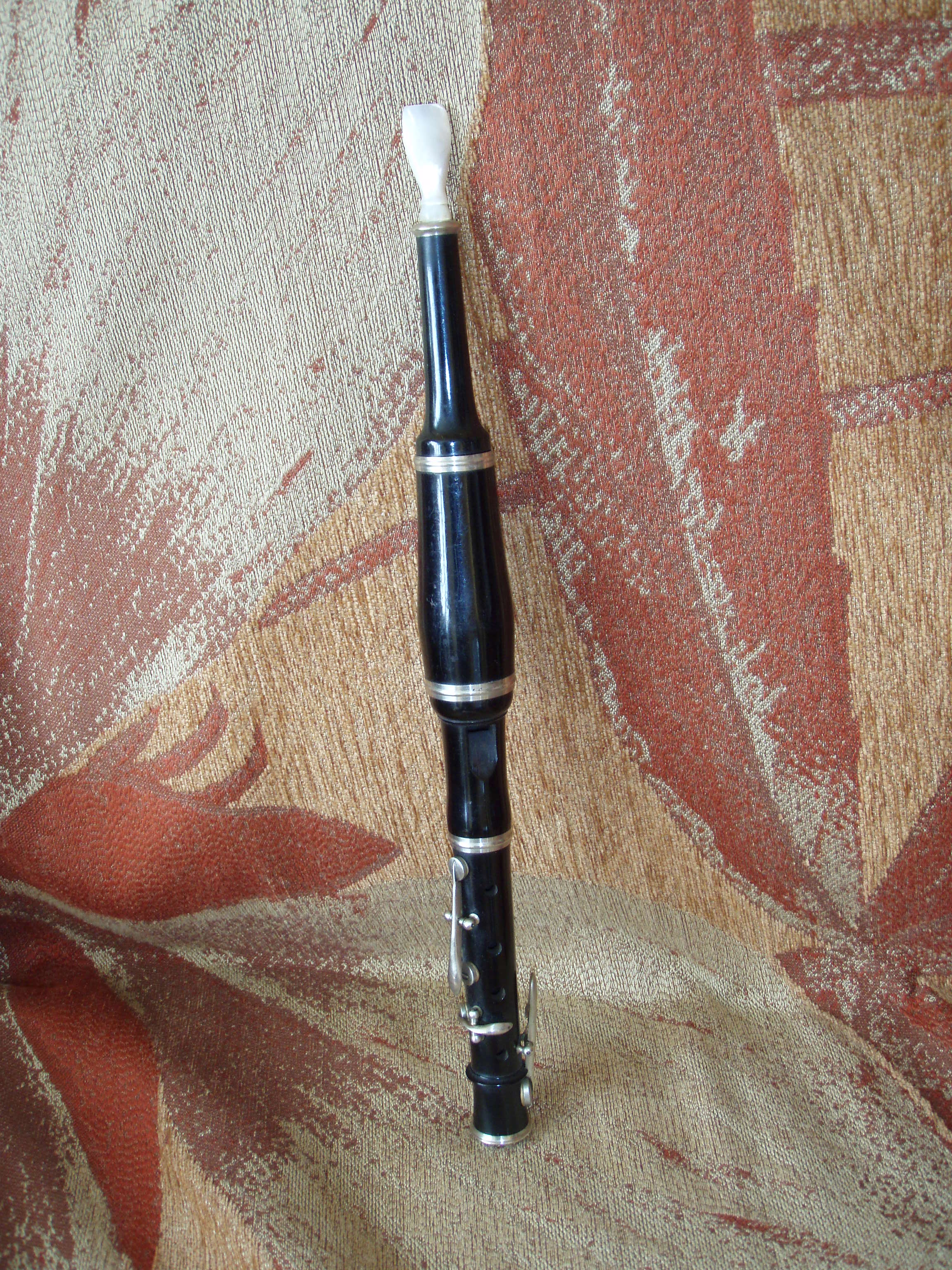 Flageolet 19ème siècle